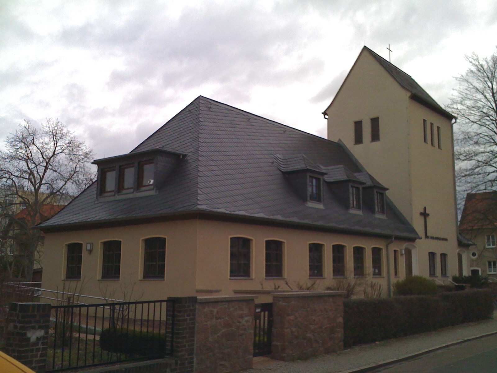 Heilandskirche in Halle (Saale)